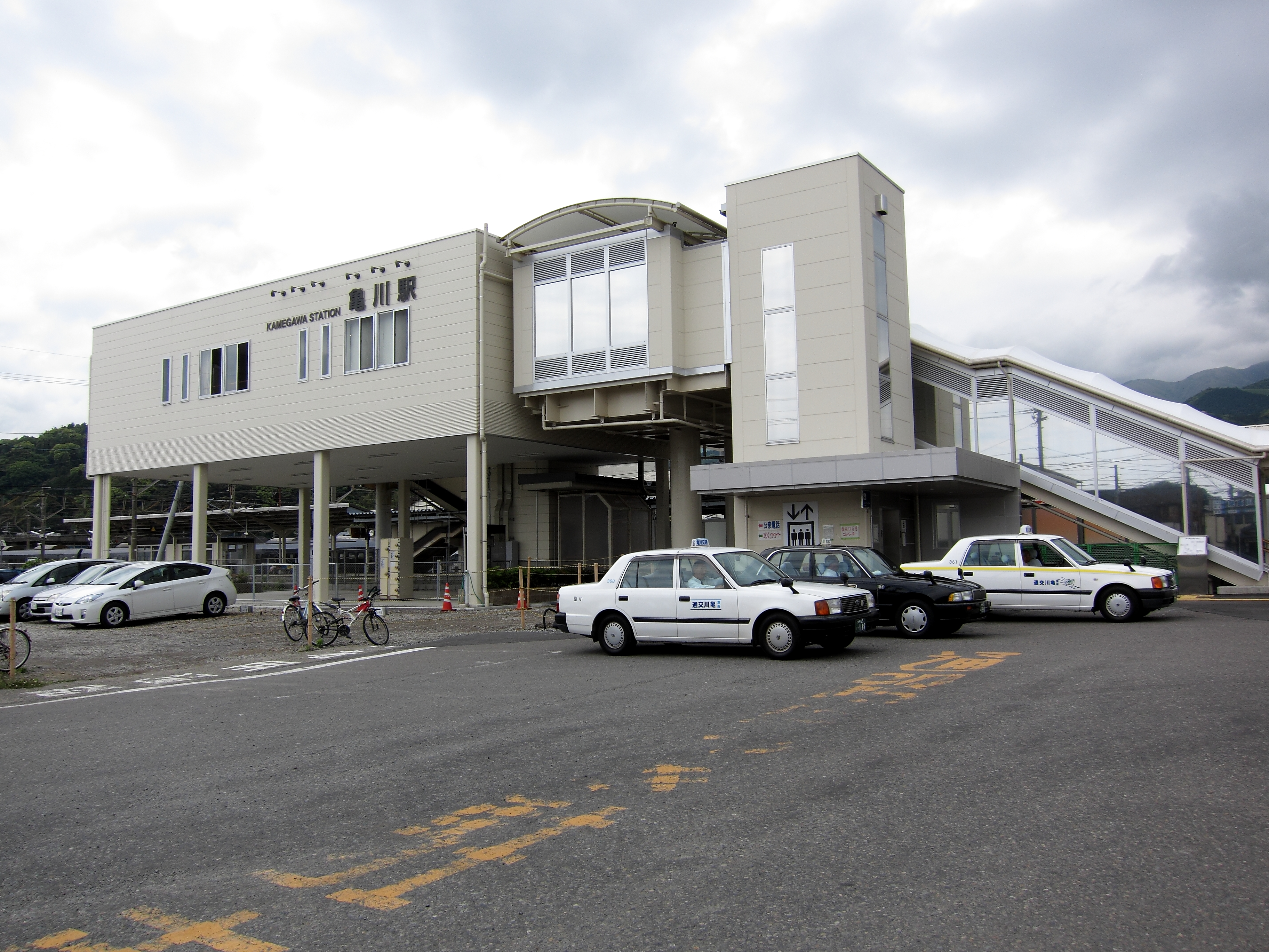 日豊本線 亀川駅